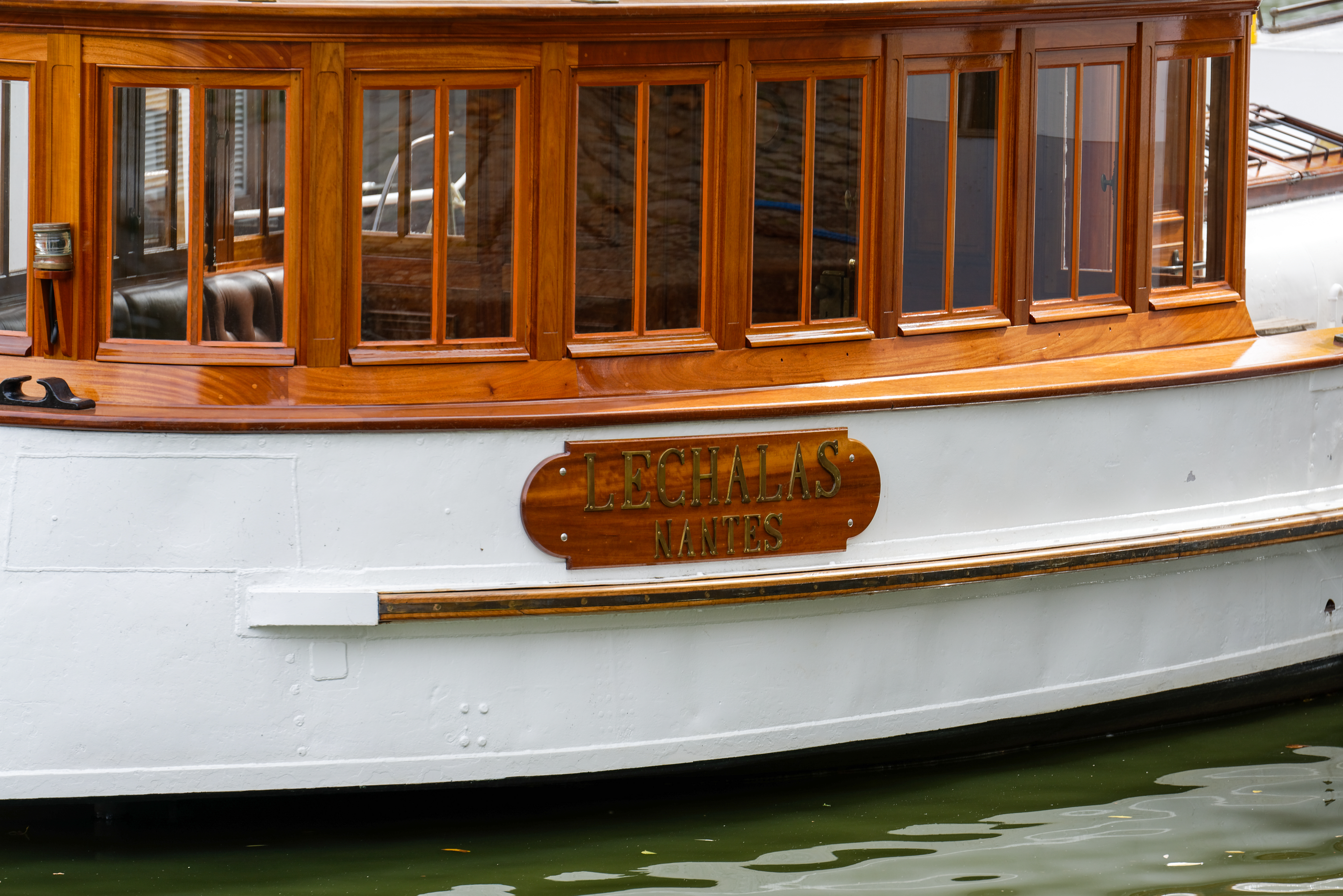 Le Lechalas Vedette à vapeur des Ponts et Chaussées. (Nantes, Loire-Atlantique, Pays de la Loire, France)